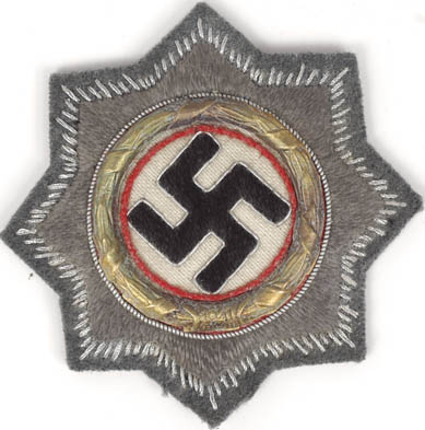 Deutsches Kreuz in Gold Stoffausführung.jpg Bild von mir!